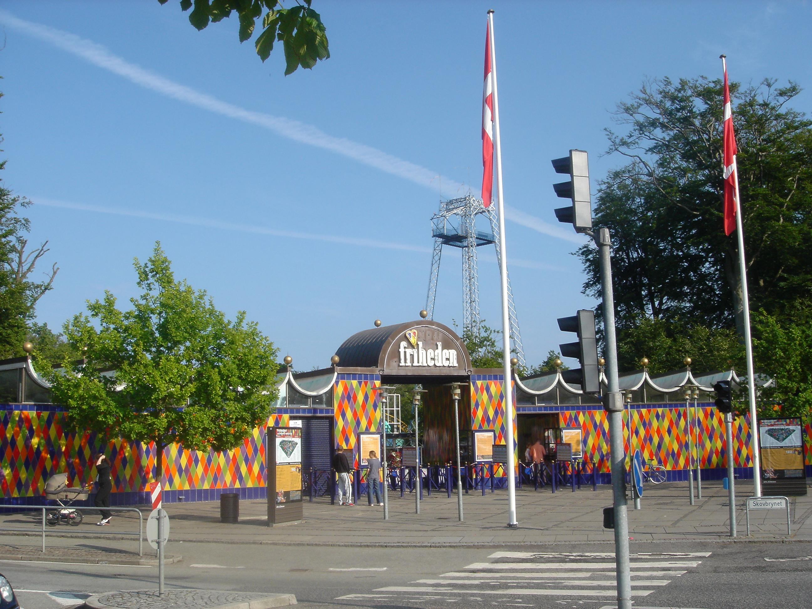 Tivoli Friheden, Danmark